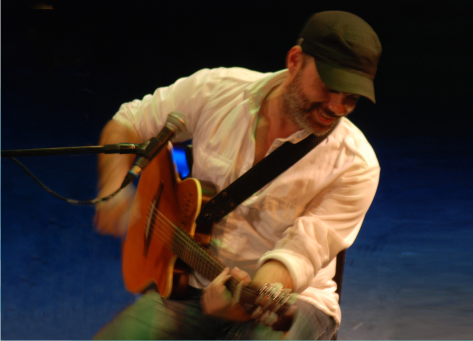 Zambayonny en 2015.